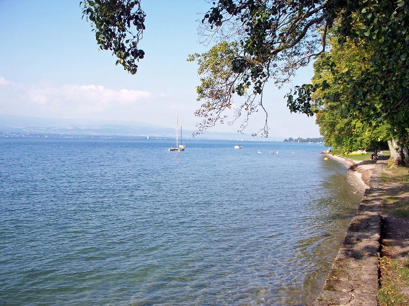 Au bord du lac Léman